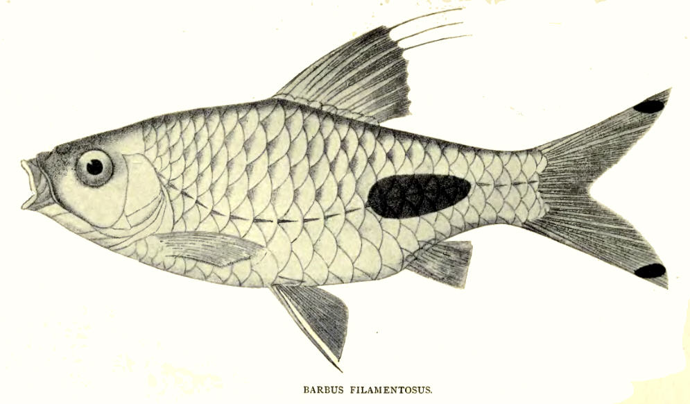 Barbus filamentosus = Puntius filamentosus (Valenciennes, 1844)